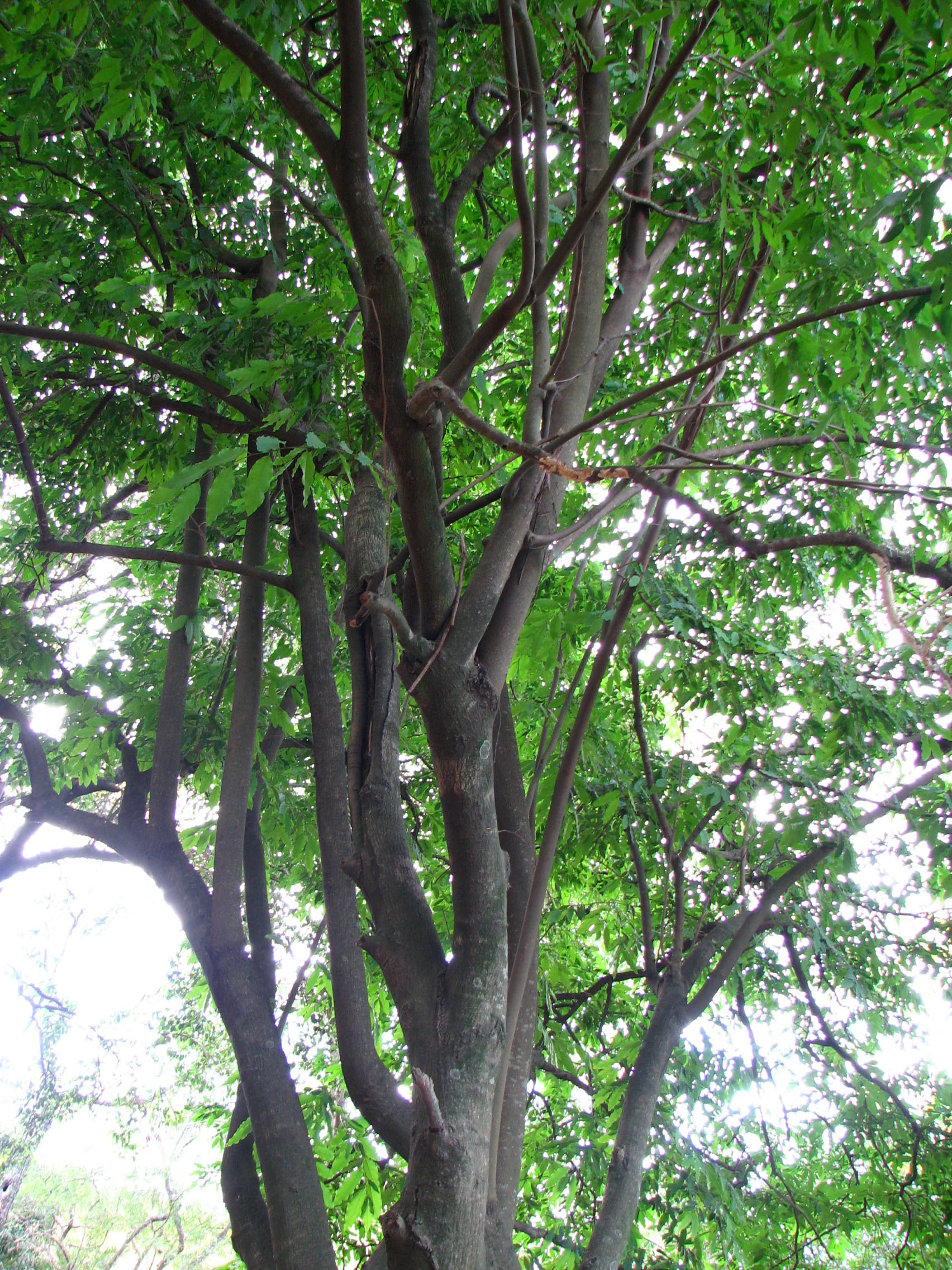 Ejemplar de Rollinia emarginata, en el Jardín Botánico de la ciudad de La Plata.